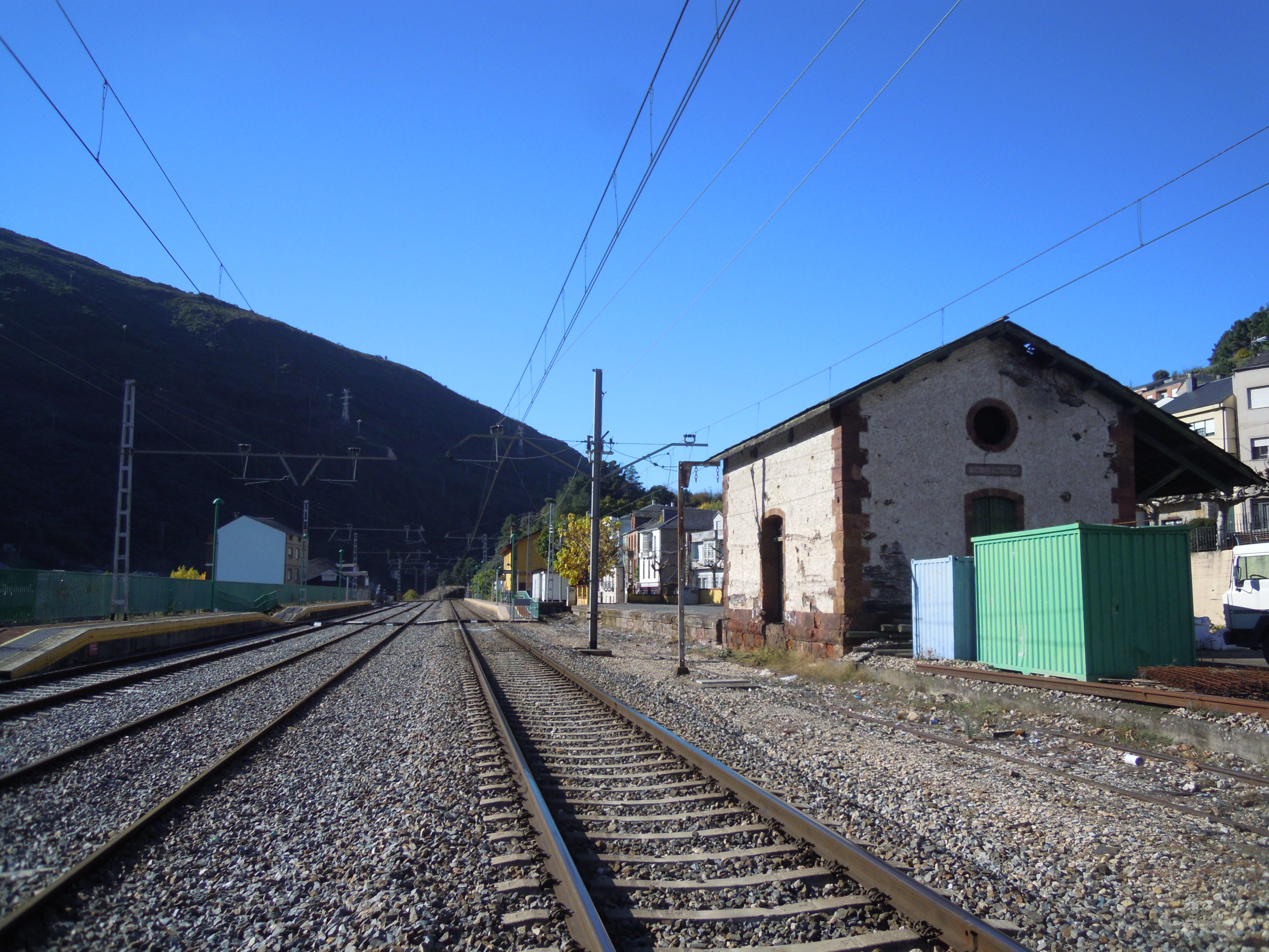 Estación de Sobradelo, en Sobradelo (Carballeda de Valdeorras). Edificio vello